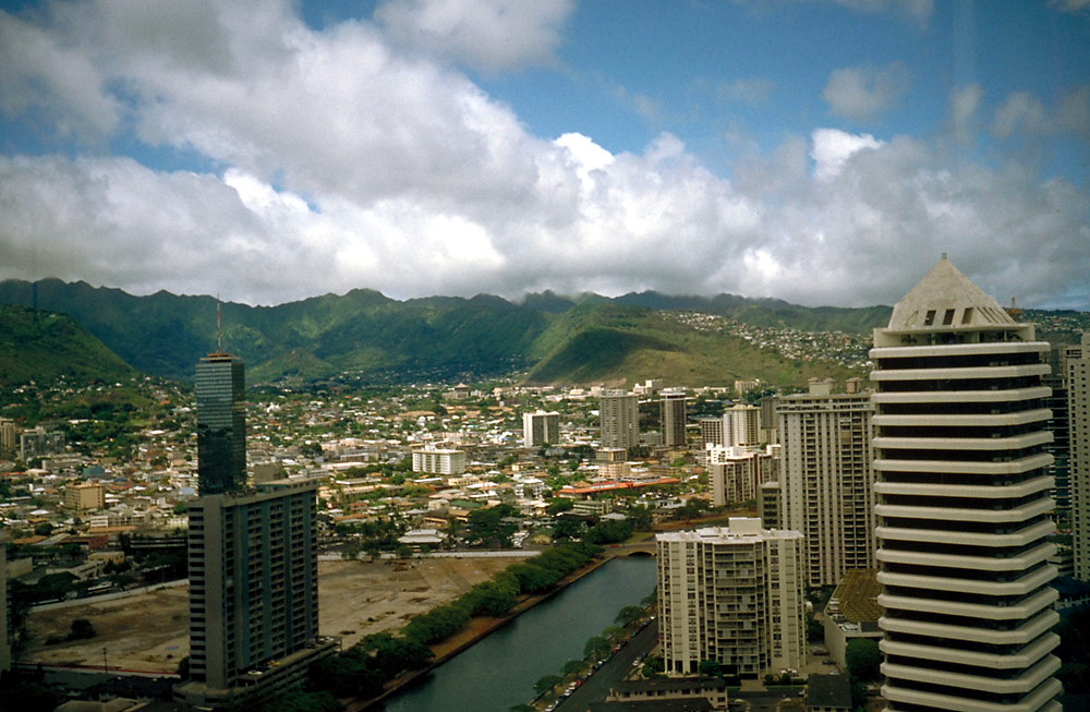 foto von Softeis